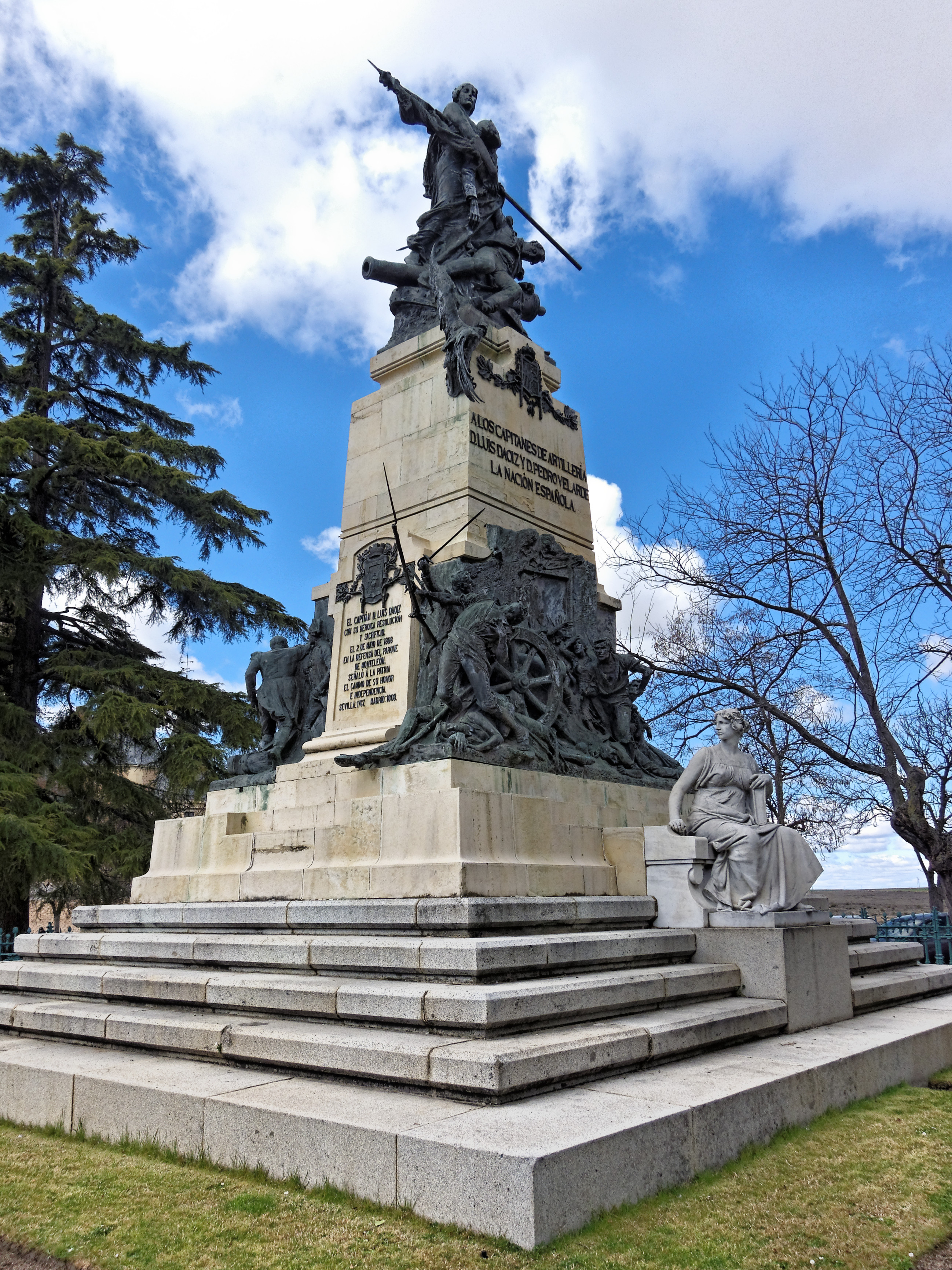 Monumento a Daoiz y Velarde en la plaza de la reina Victoria Eugenia, Salamanca.